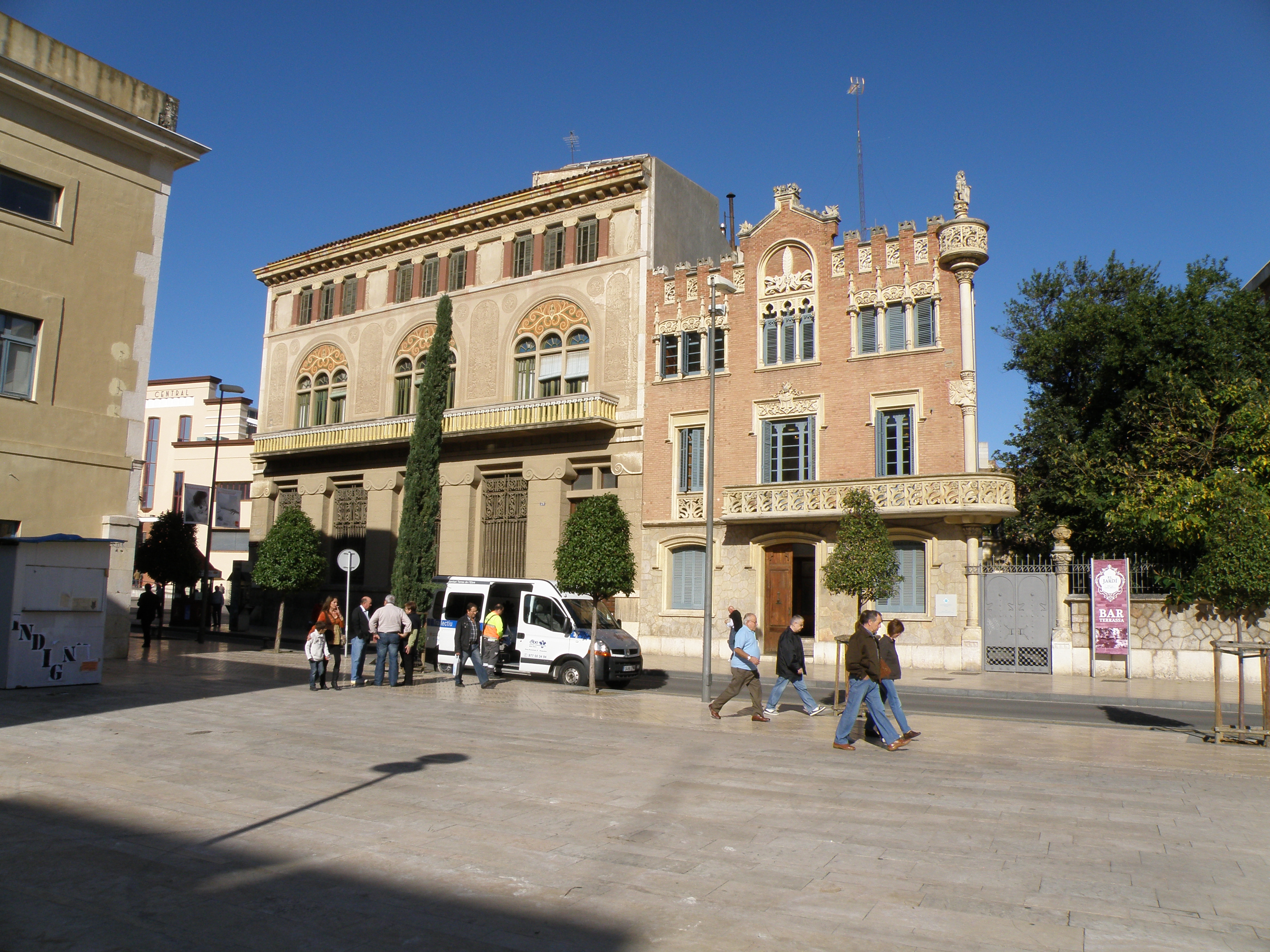 A l'esquerra Casa Gasull i a la dreta Casa Rull, Reus, Baix Camp.